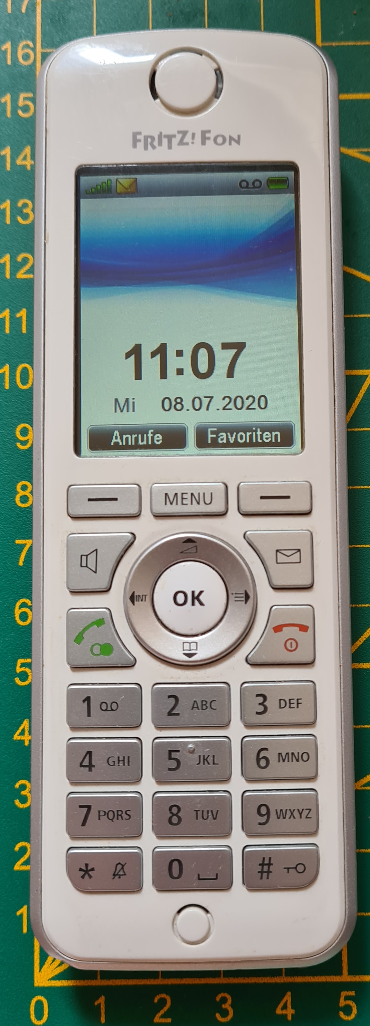 FRITZ!Fon C4 - DECT-Schnurlostelefon der Firma AVM